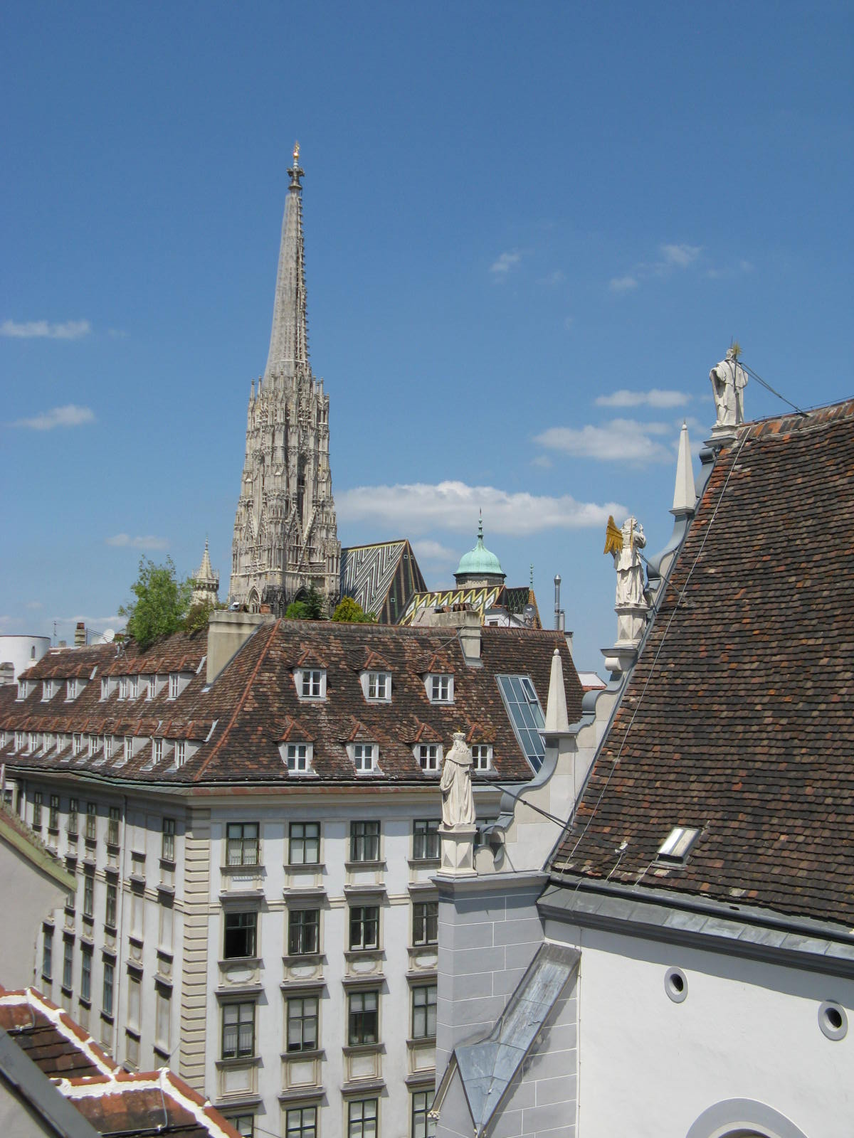 Stephansdom, Dom- und Metropolitankirche St. Stephan. Blick über die Innenstadt vom Franziskanerplatz Richtung Stephansturm: Rechts vorne ein Dachausschnitt der Franziskanerkirche mit Figuren des Renaissancegiebels. Links denkmalgeschütztes Haus Franziskanerplatz 1, das Orellisches Haus.